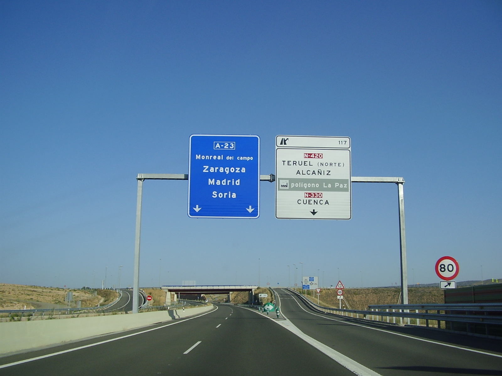 Indicador de la A-23